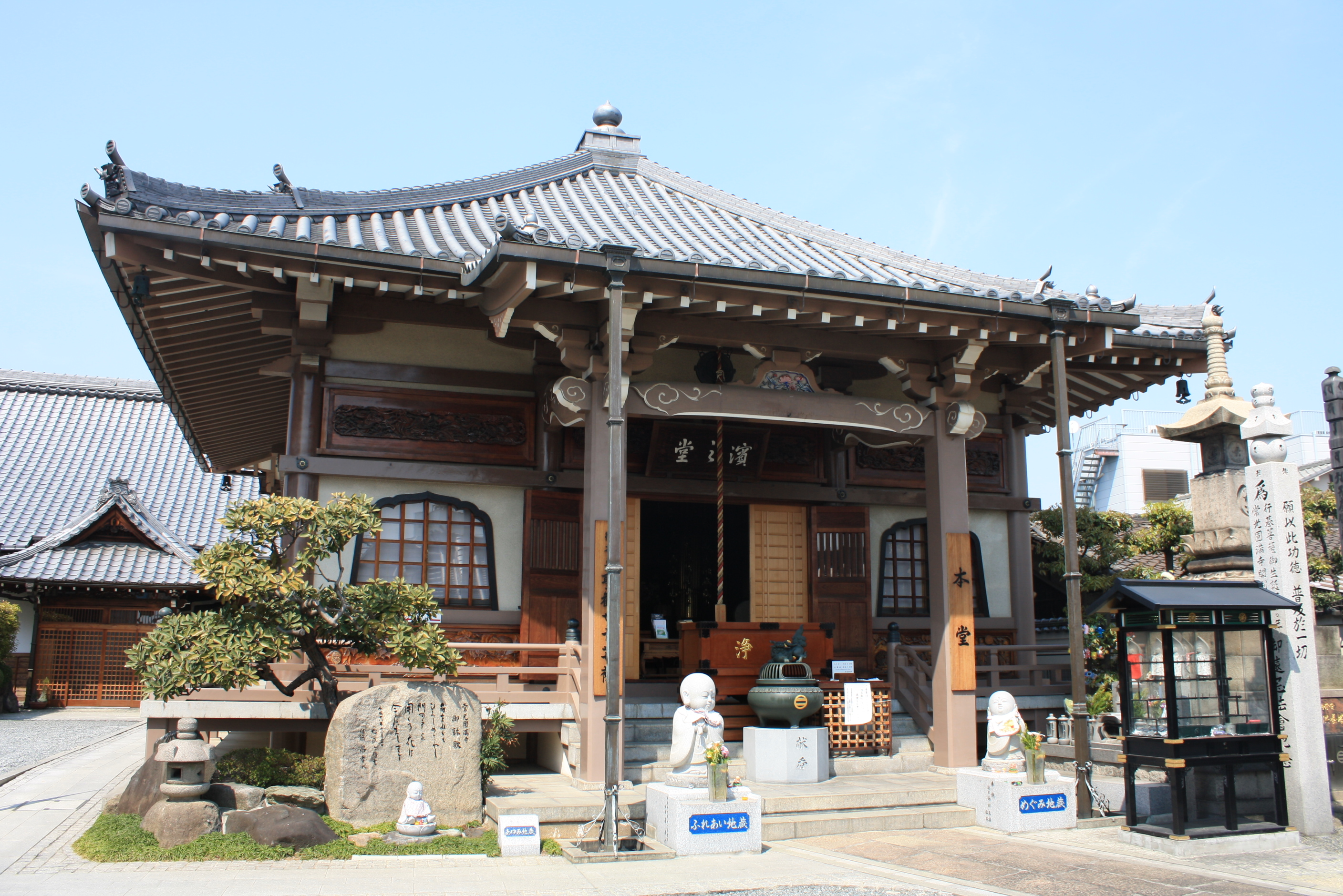 本堂は浜辺に建立されたことから、現在でも「浜の堂」として地域の方に親しまれている